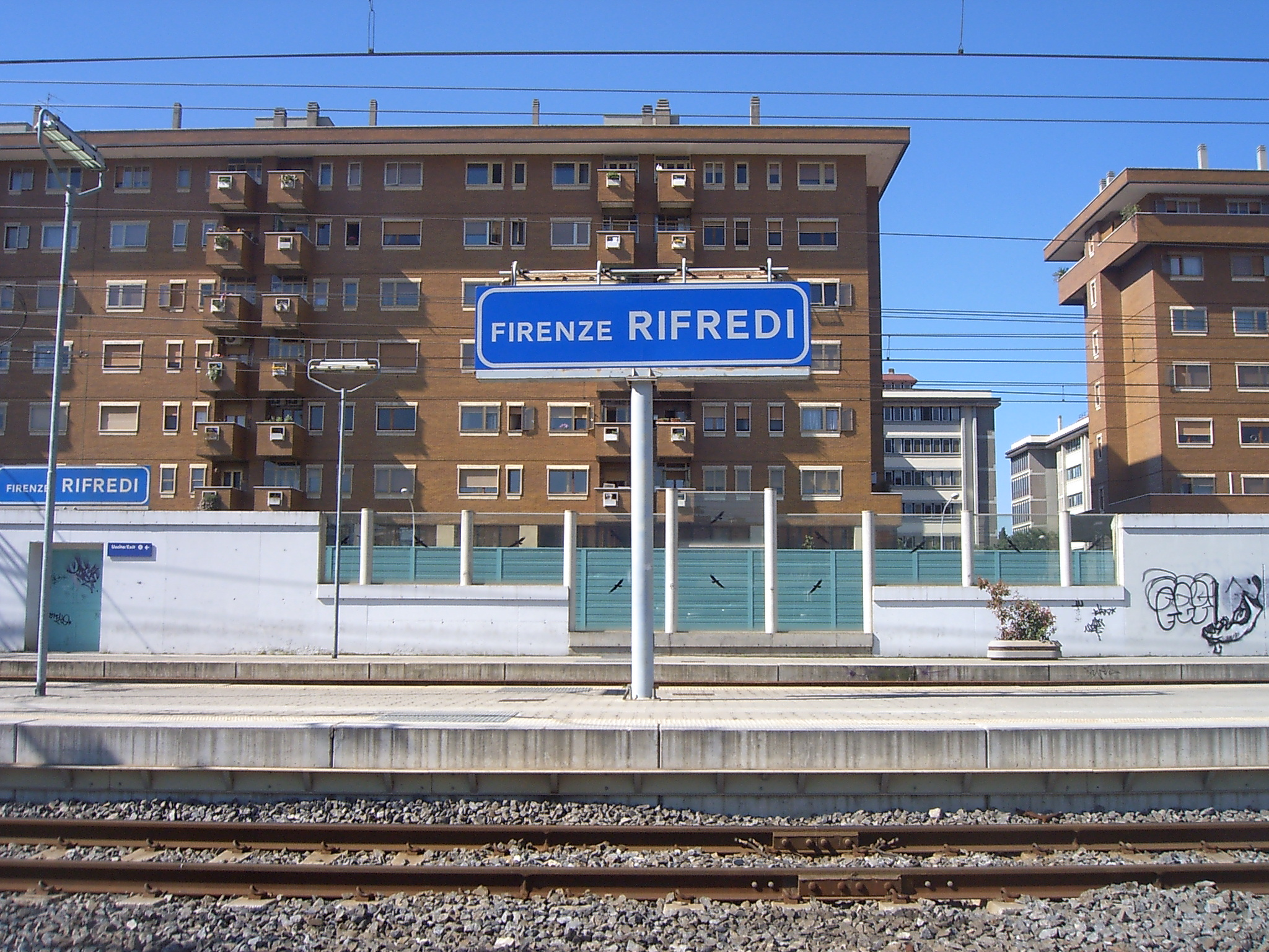 Rifredi station, Firenze